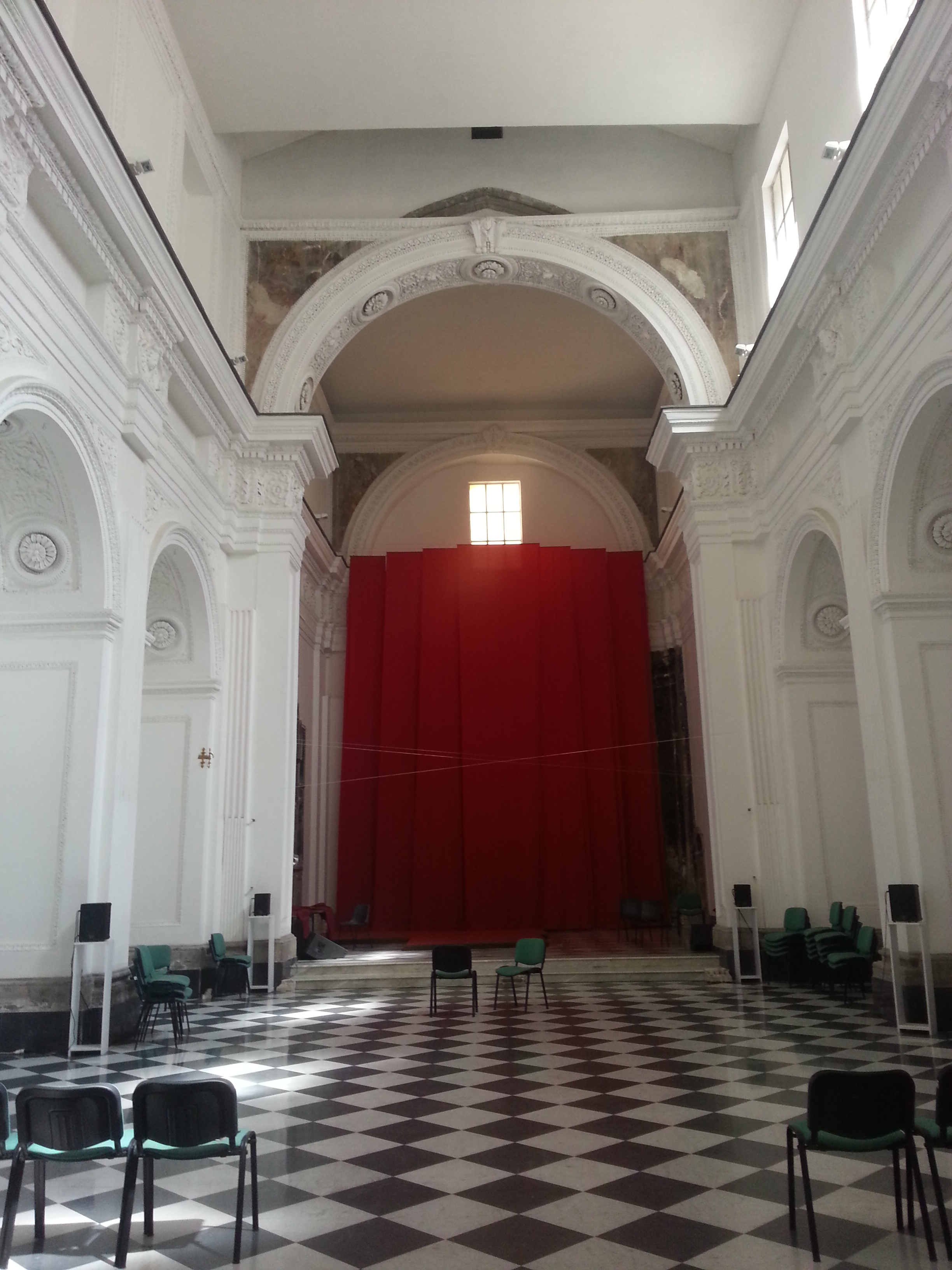 Interno